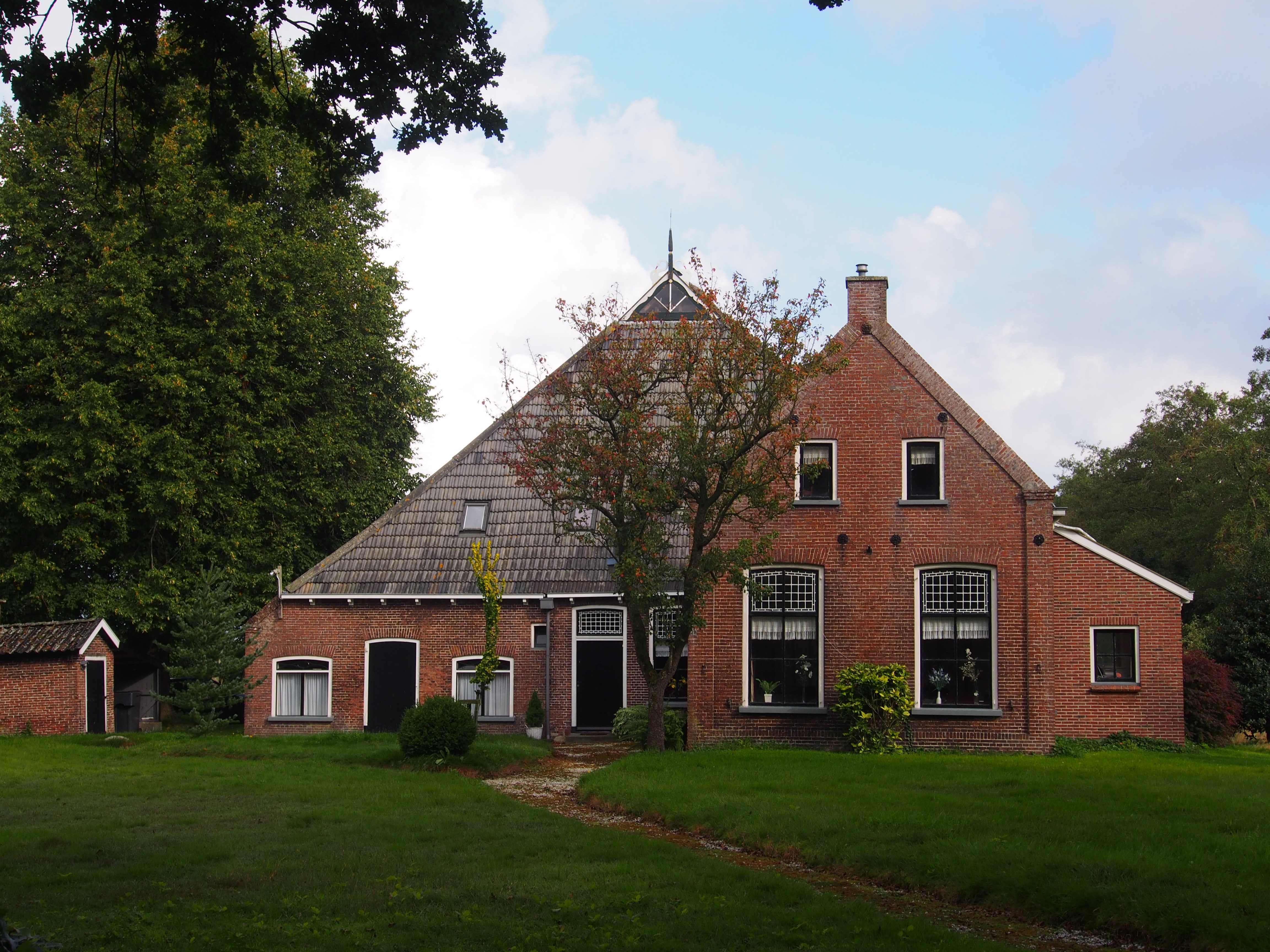 Kaetsjemuoiwei 28, Moleneind